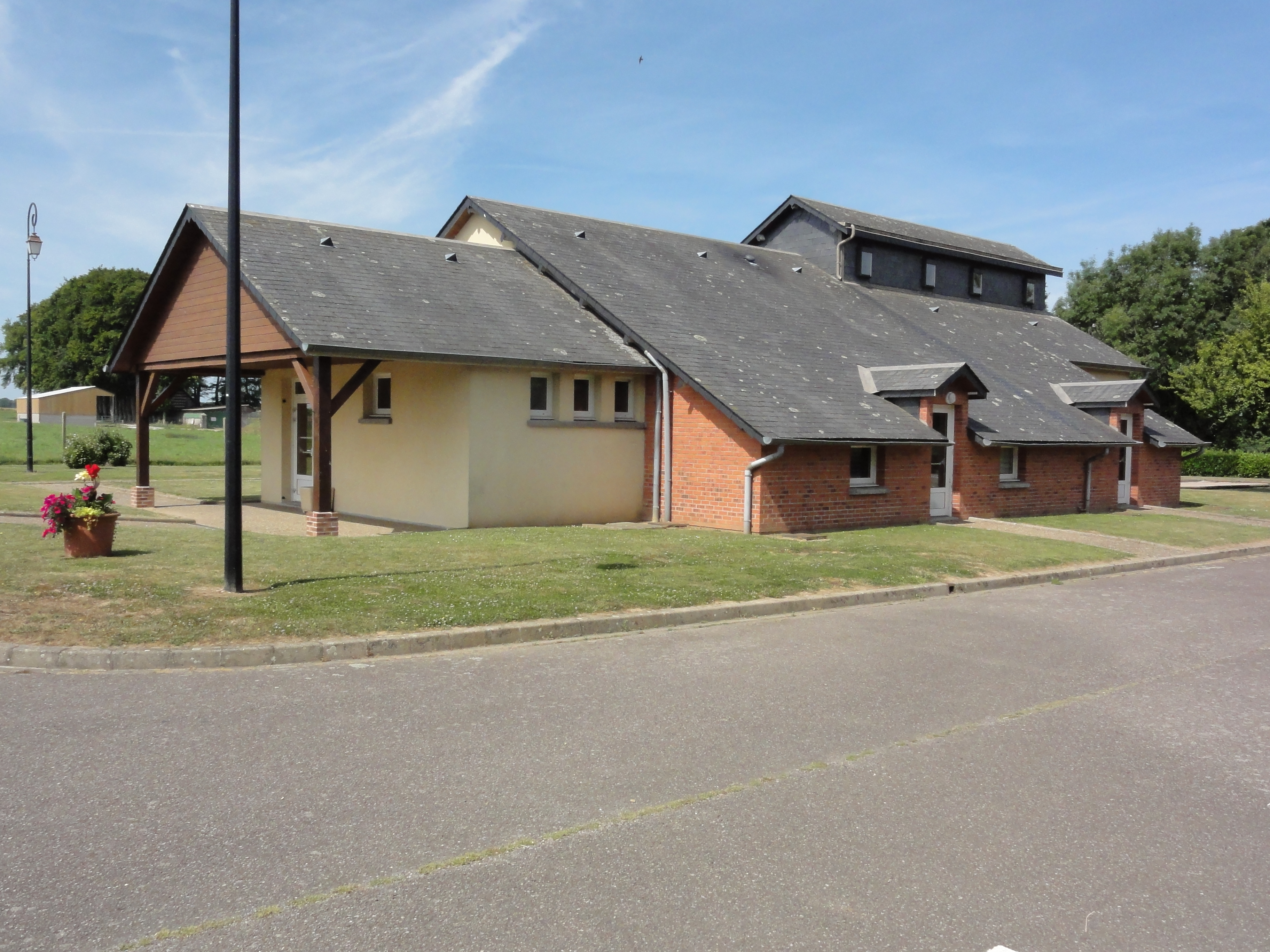 Bertreville (Seine-Mar.) salle des fêtes